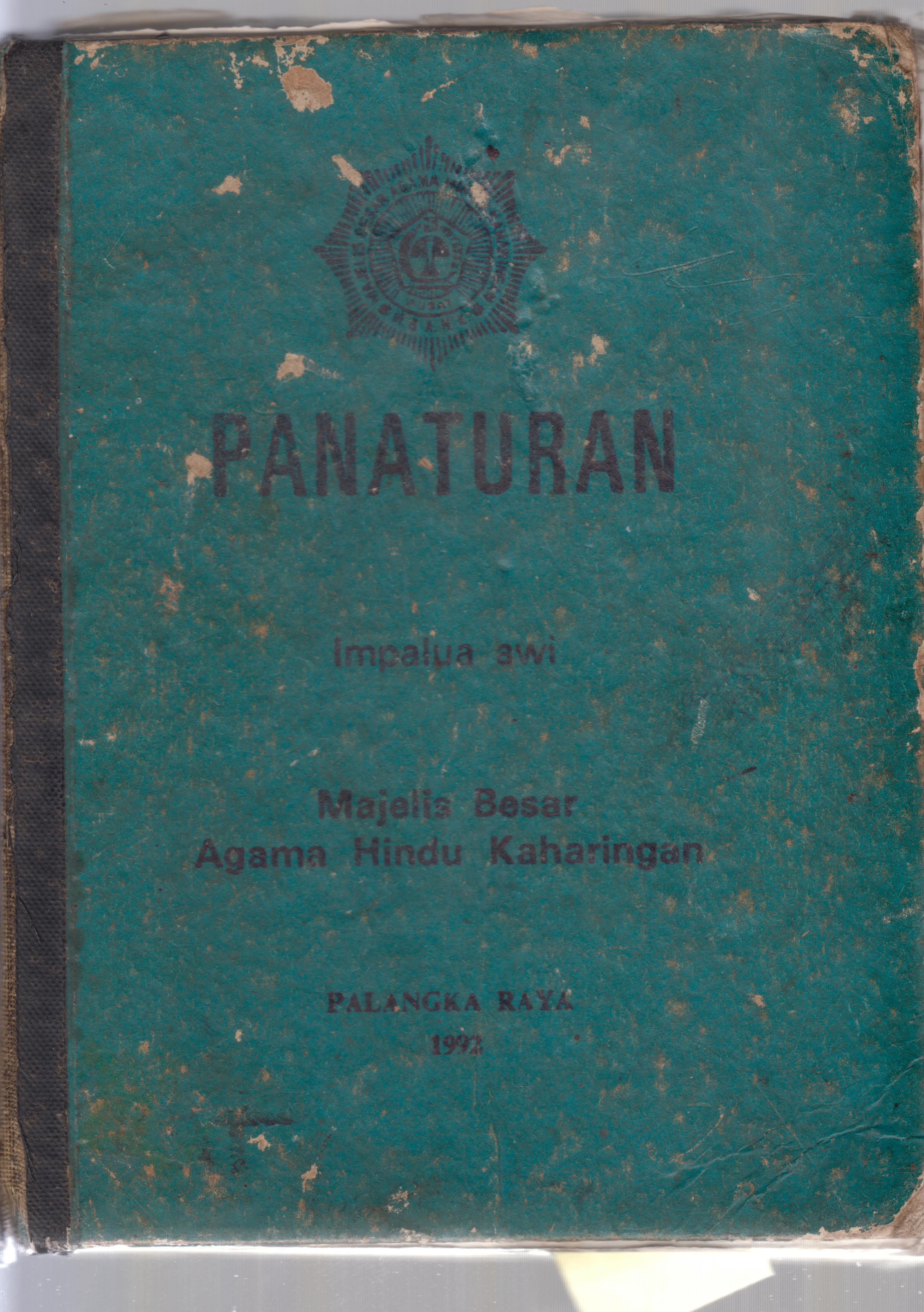 Panaturan yang diterbitkan pada tahun 1992. Panaturan ini diyakini sebagai kitab mula-mula yang otentik.